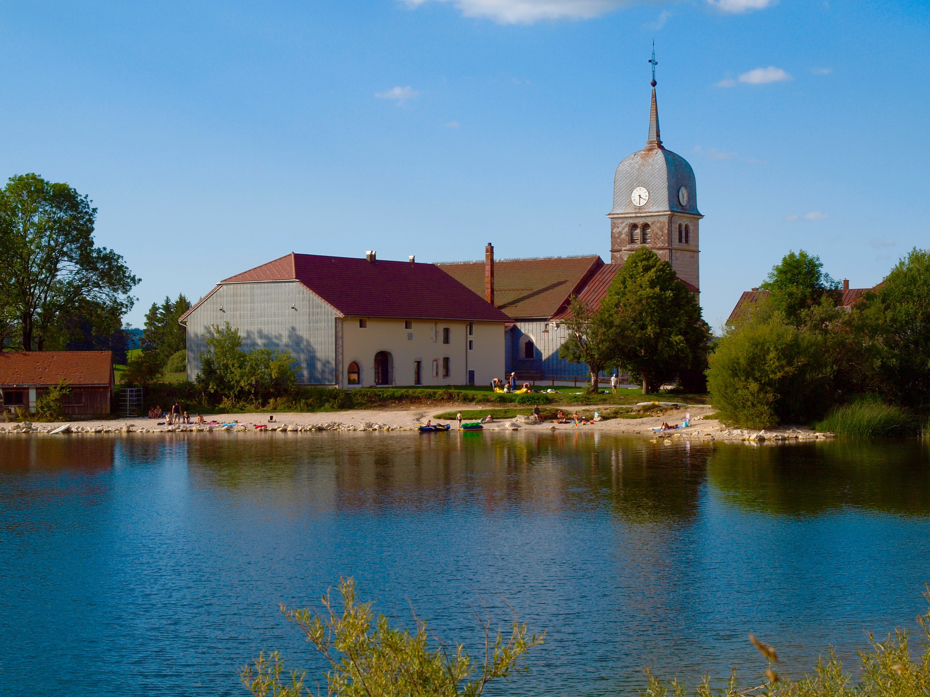 L'abbaye en/de Grandvaux au bord du lac de l'abbaye sur la commune de Grande Rivière dans le département du Jura en Franche Comté .